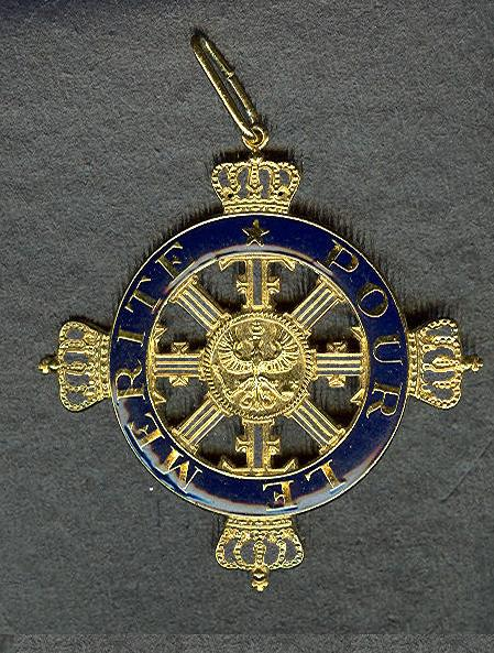 Pour le Mérite für Wissenschaften und Künste (Replik).